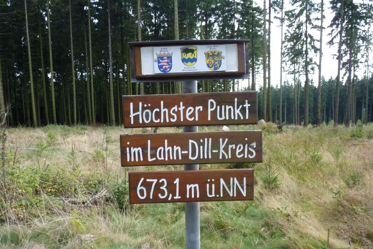 Höhenangabe auf dem Jagdberg am höchsten Punkt der Eisenstraße